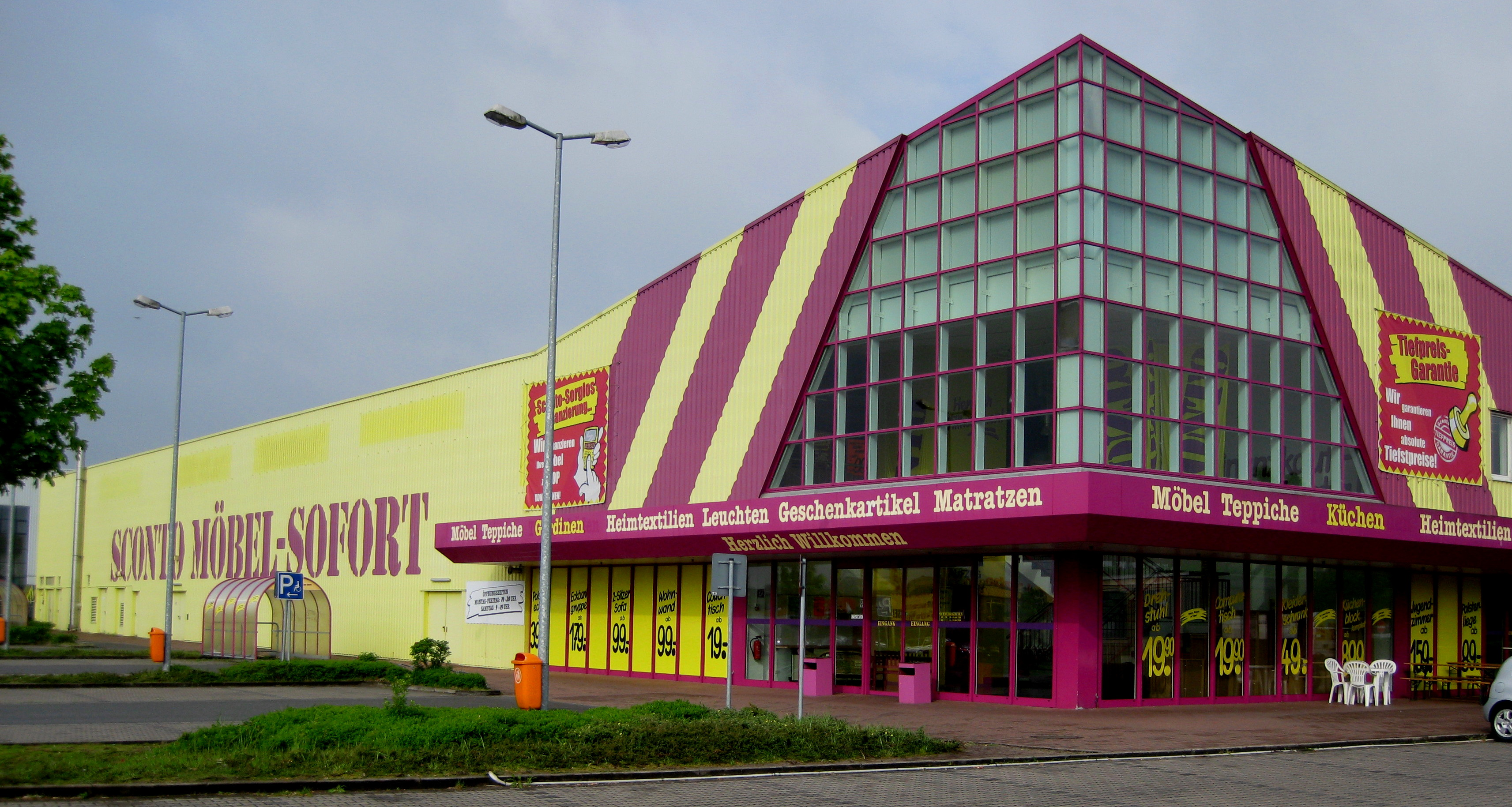 Lübecker Möbelhaus von Sconto Möbel